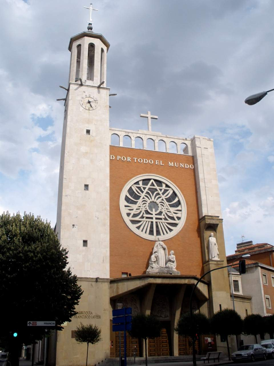 Iglesia de San Francisco Javier (Pamplona)